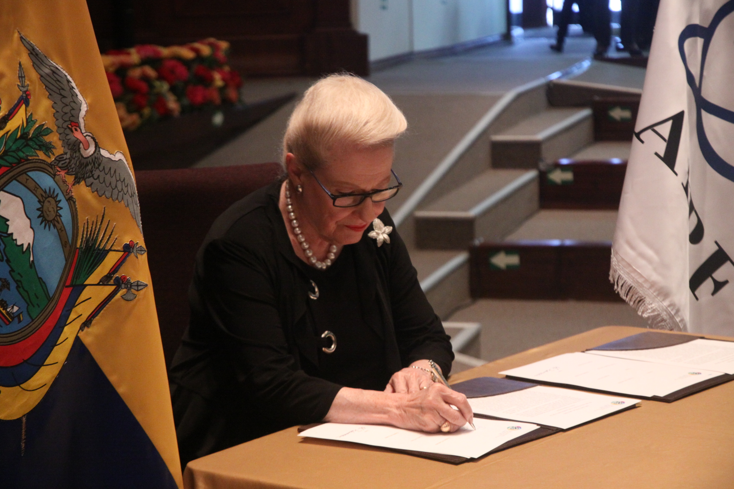 Quito, 14 enero de 2015.- Firma de la declaratoria conjunta y adopción de las resoluciones en el 23º Foro Parlamentario Asia Pacífico Fotografía: Hugo Ortiz / Asamblea Nacional